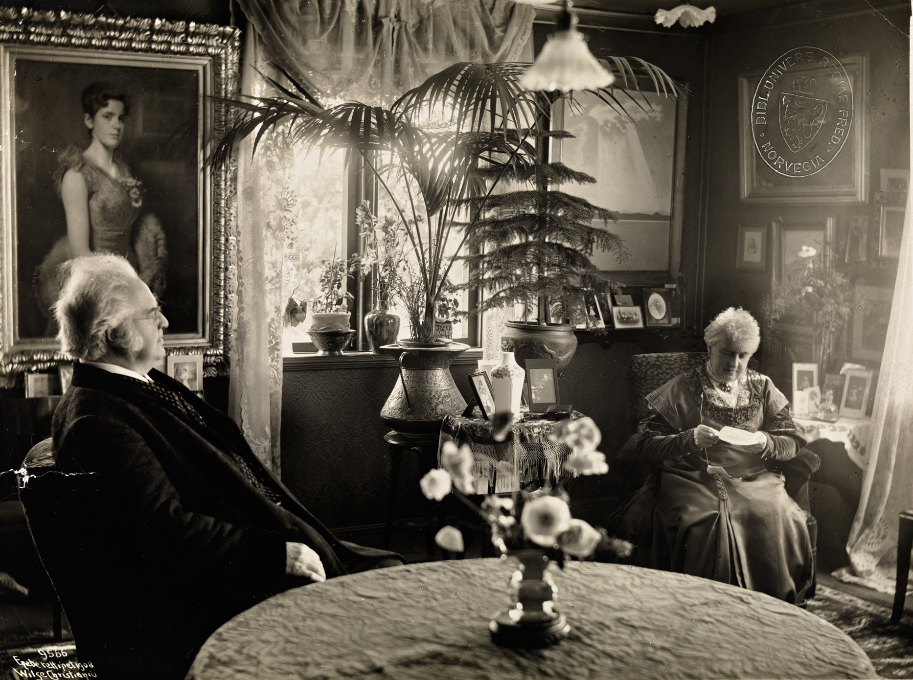 Bjørnstjerne Bjørnson og Karoline i stua på Aulestad, 1908. Tittel / Title: Bjørnstjerne Bjørnson og Karoline i stua på Aulestad, 1908. / Karoline and Bjørnstjerne Bjørnson, 1908. Motiv / Motif: Karoline Bjørnson, Bjørnstjerne Bjørnson, in the livingroom at Aulestad. Dato / Date: 1908 Fotograf / Photographer: Anders Beer Wilse (1865-1949) Sted / Place: Aulestad, Gausdal Eier / Owner Institution: Nasjonalbiblioteket / National Library of Norway Lenke / Link: Bildesignatur / Image Number: no-nb_bldsa_BB0786